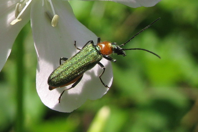 Anogcodes seladonius (Oedemeridae, Coleoptera). Llavorsí (Lérida, España)